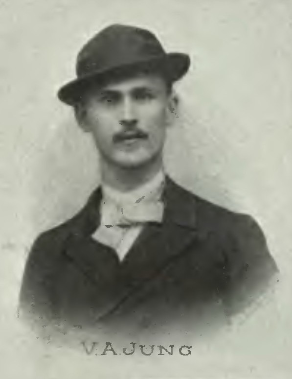 Portrét – Václav Alois Jung (1858-1927), Český univerzitní profesor a novinář.